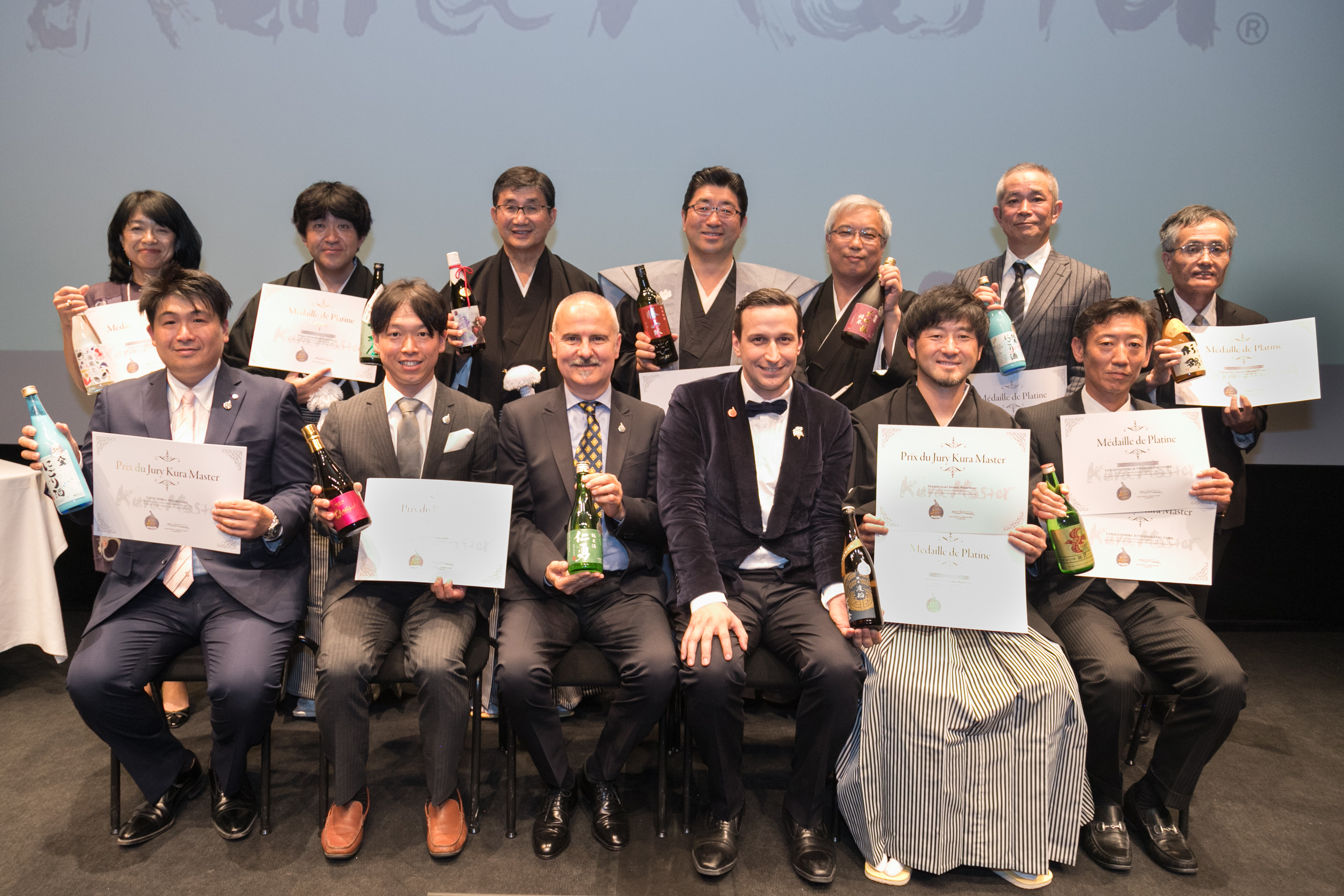 2018年7月パリ日本文化会館でTOP12の蔵元が日本から集まり、授賞式が行われた。